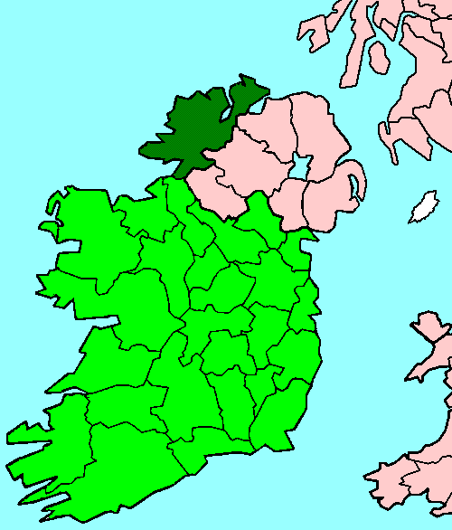 Donegal